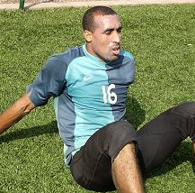 Khalid_Askri.PNG